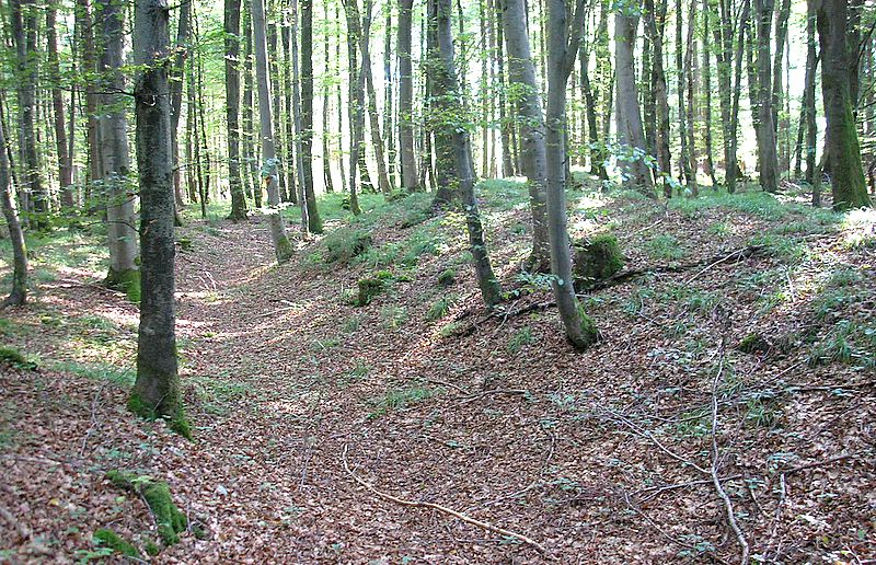 Frühmittelalterliche Wallanlage "Burg" zwischen Unterfinning und Windach (Landkreis Landsberg am Lech, Oberbayern). Die Vorburg von Nordosten / Early Middle Ages hill fort "Burg" between Unterfinning and Windach (Landkreis Landsberg am Lech, Upper Bavaria, Germany). The bailey, seen from the north east.